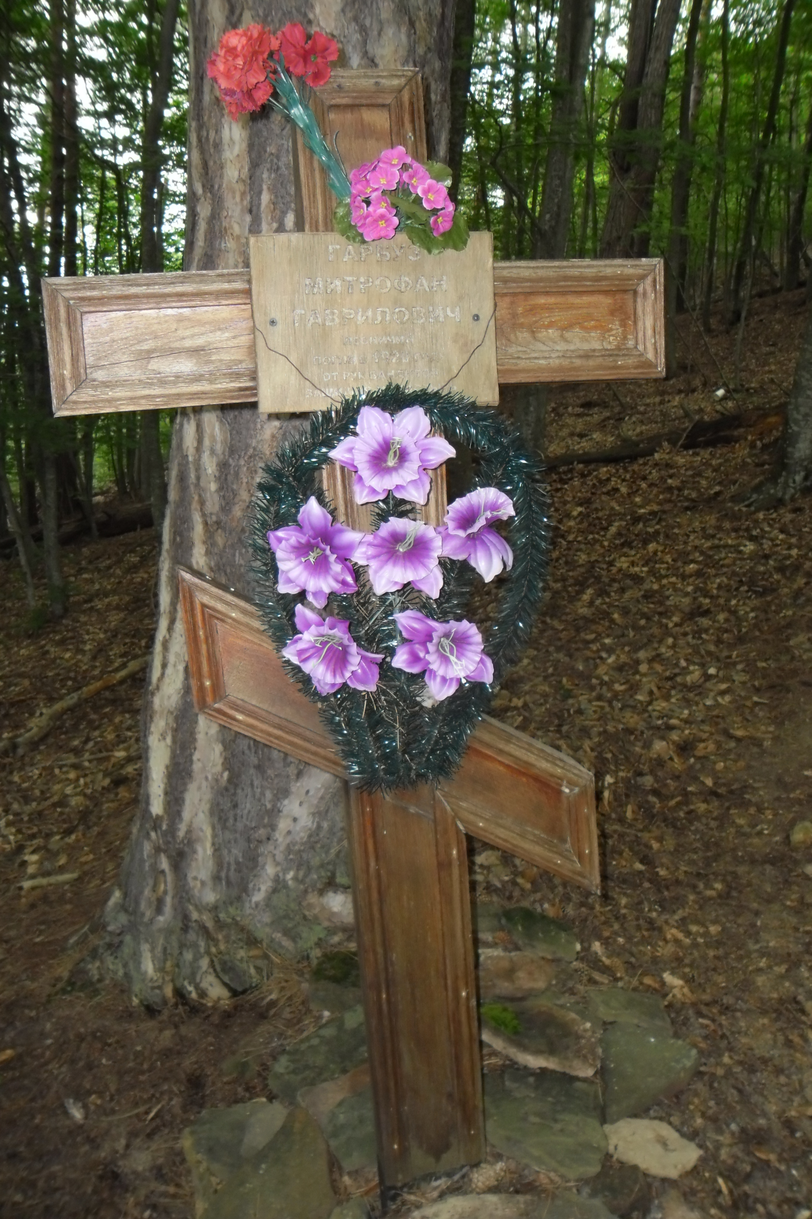 Фото